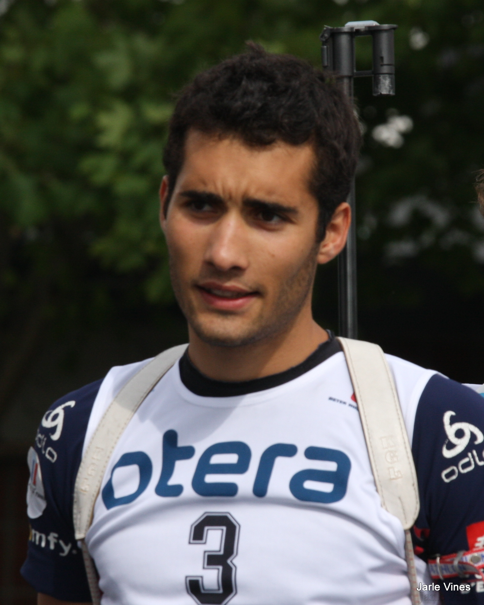 Martin Fourcade under Blinkfestivalen i Sandnes